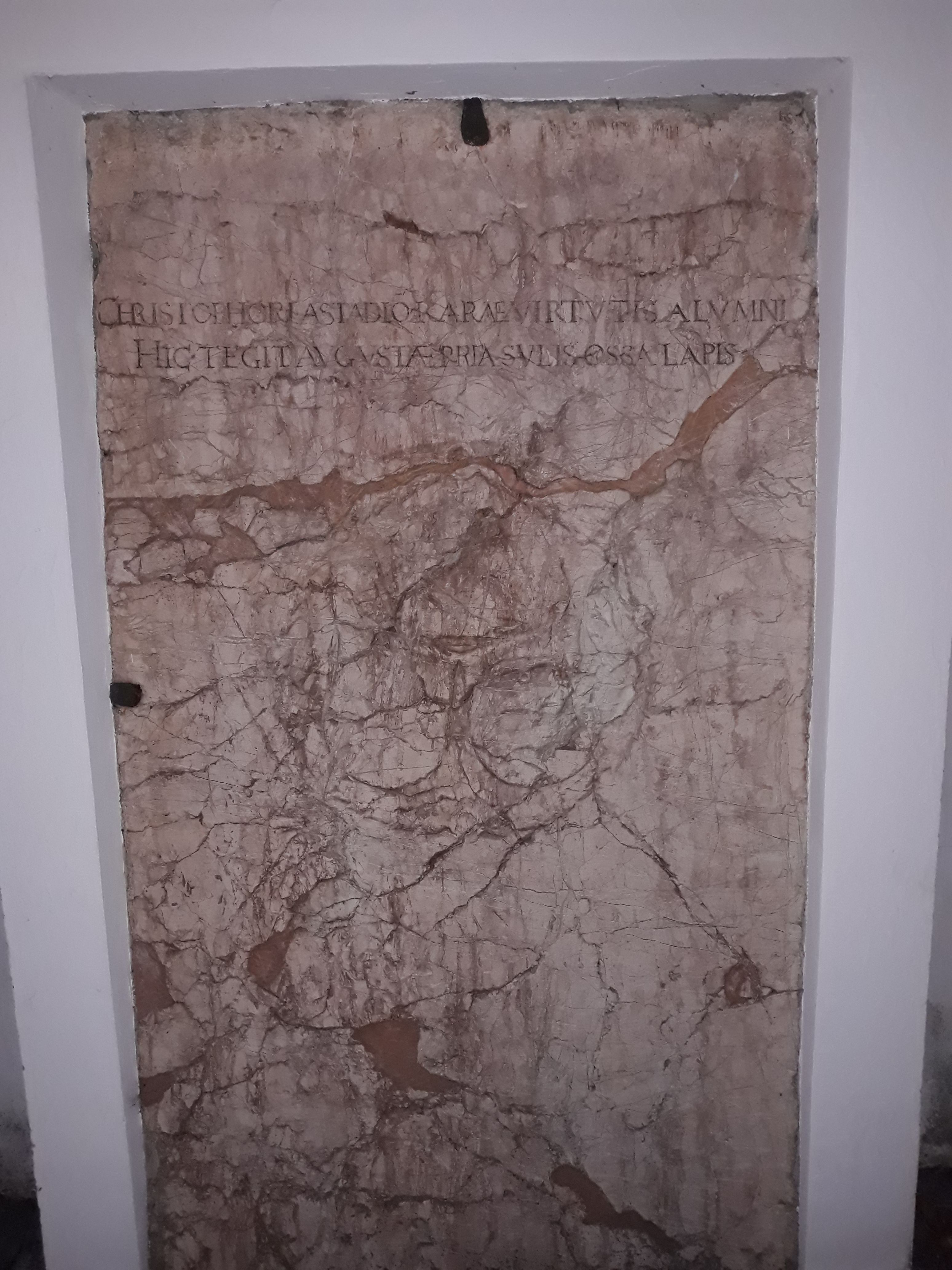 Das Grab des Augsburger Bischofs Christoph von Stadion an der Basilika St. Peter in Dillingen.